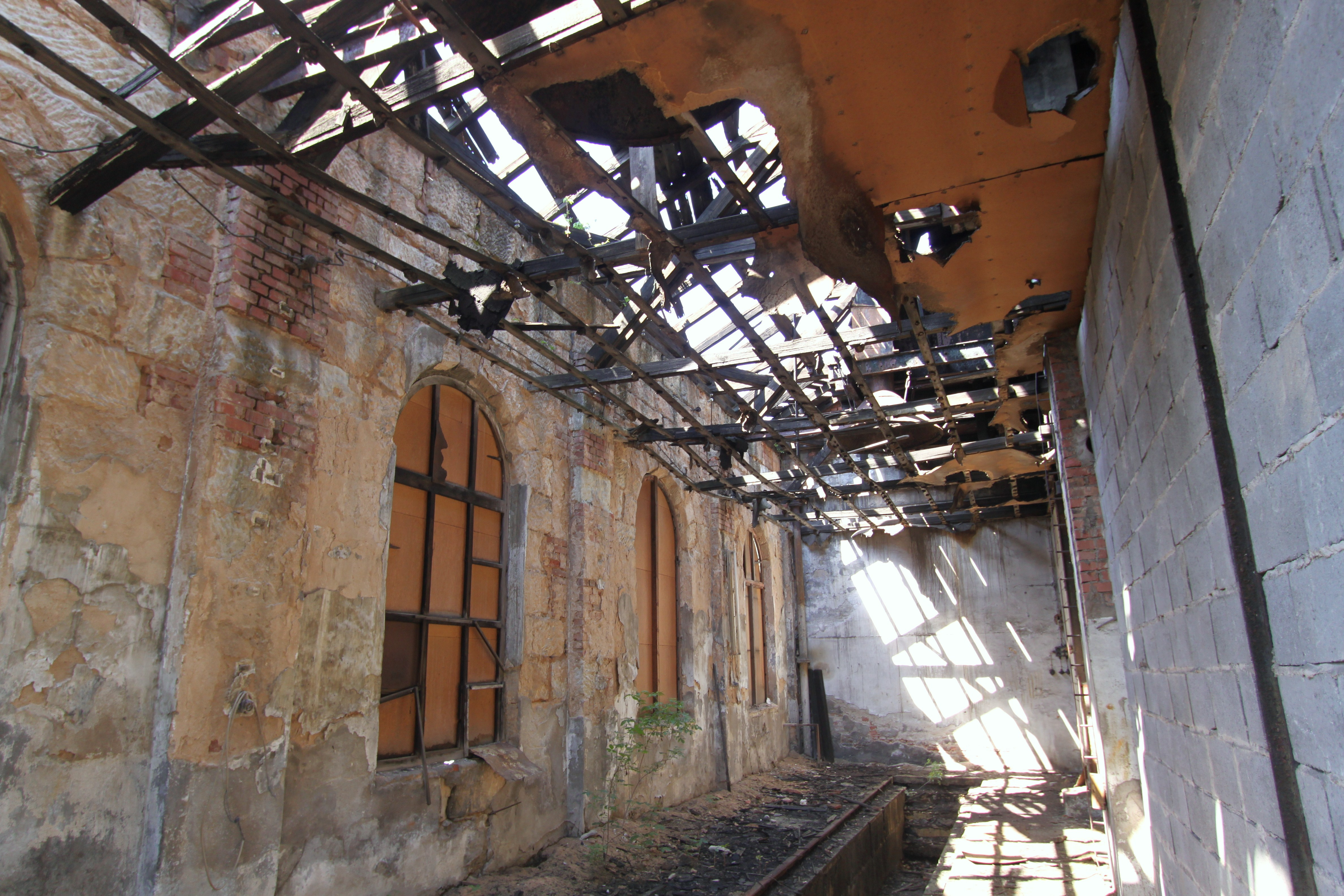 Innenraum des Lokschuppens an der Stadtgrenze Nürnberg/Fürth (Fürth, Karolinenstraße 90, nahe U-Bahnstation Stdtgrenze) evtl. schon 1844 oder um 1865. Da die Bahn und die Verwaltungsgesellschaft Aurelis über Jahrzehnte jegliche Unterhaltsmaßnahmen unterließ und selbst Anordnungen auf Notsicherung des Daches gerichtlich abweisen läßt, ist das Gebäude in einem äußerst schlechten Zustand.